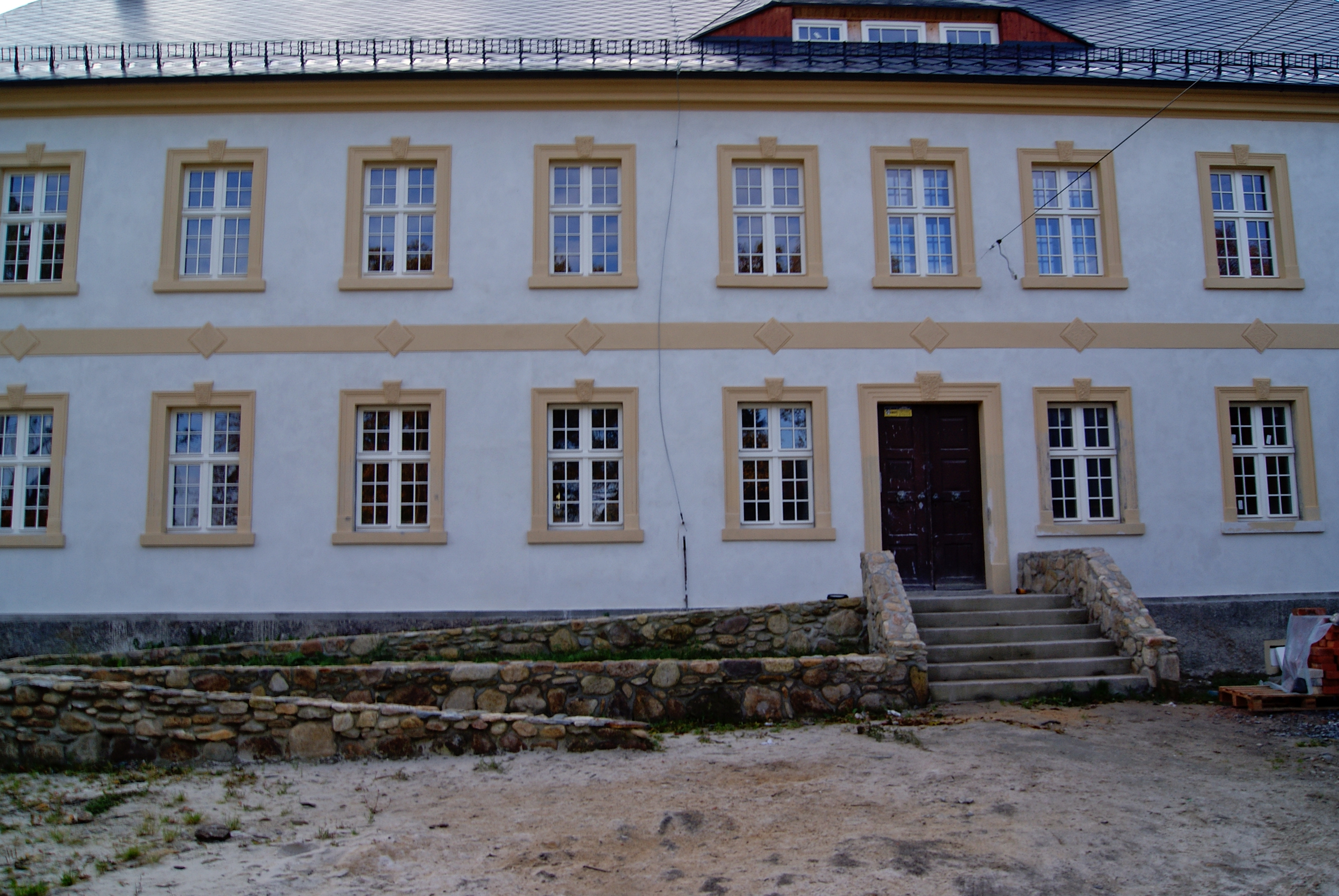 Czerniawa-Zdrój, ul. Lwówecka 5 - młyn wodny (tzw. "Czarci młyn") z systemem hydroenergetycznym i wyposażeniem, 1890 (zabytek nr 339/1256/J z 28.03.1996)